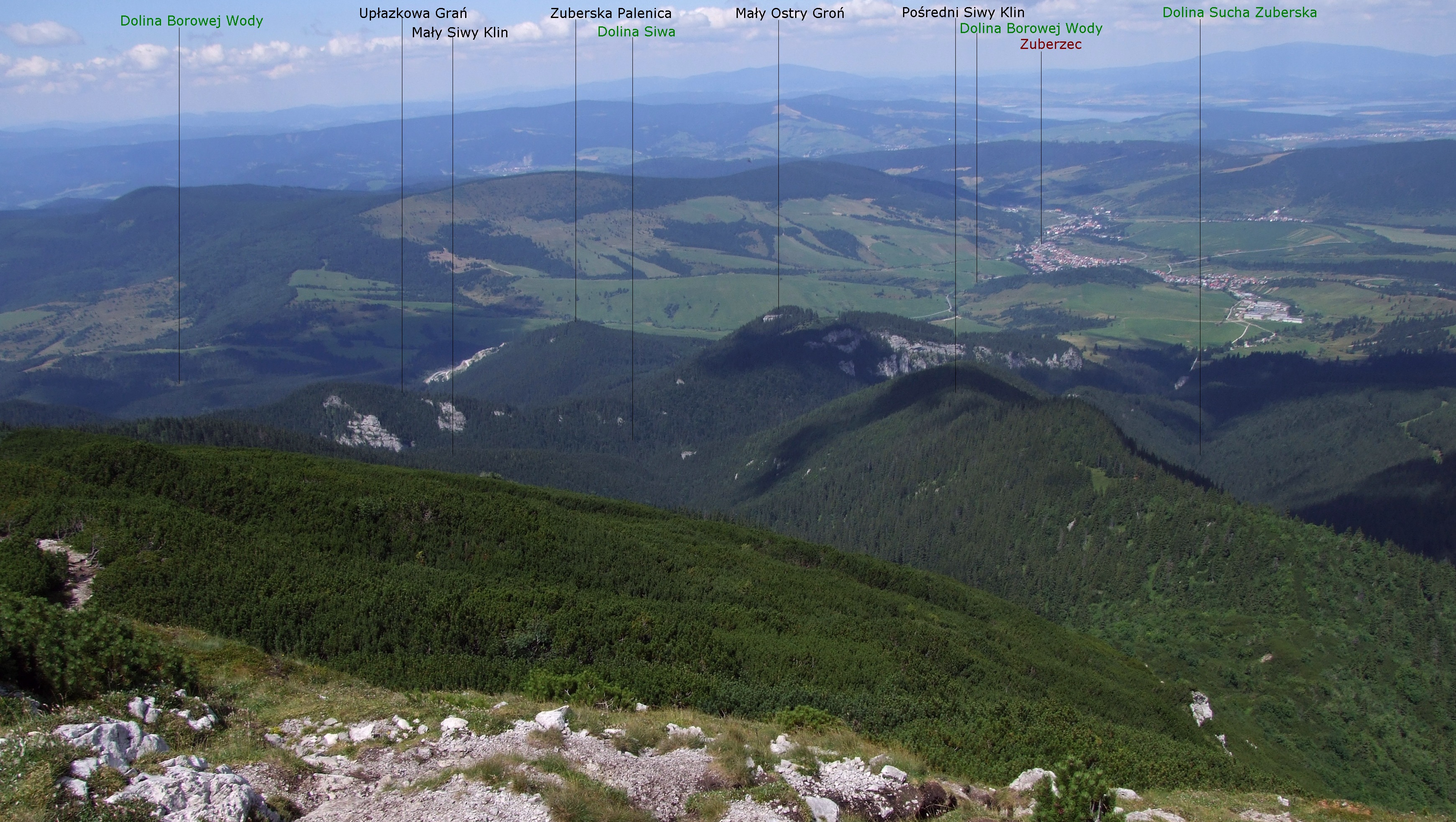 Widok z Siwego Wierchu na Kotlinę Zuberską